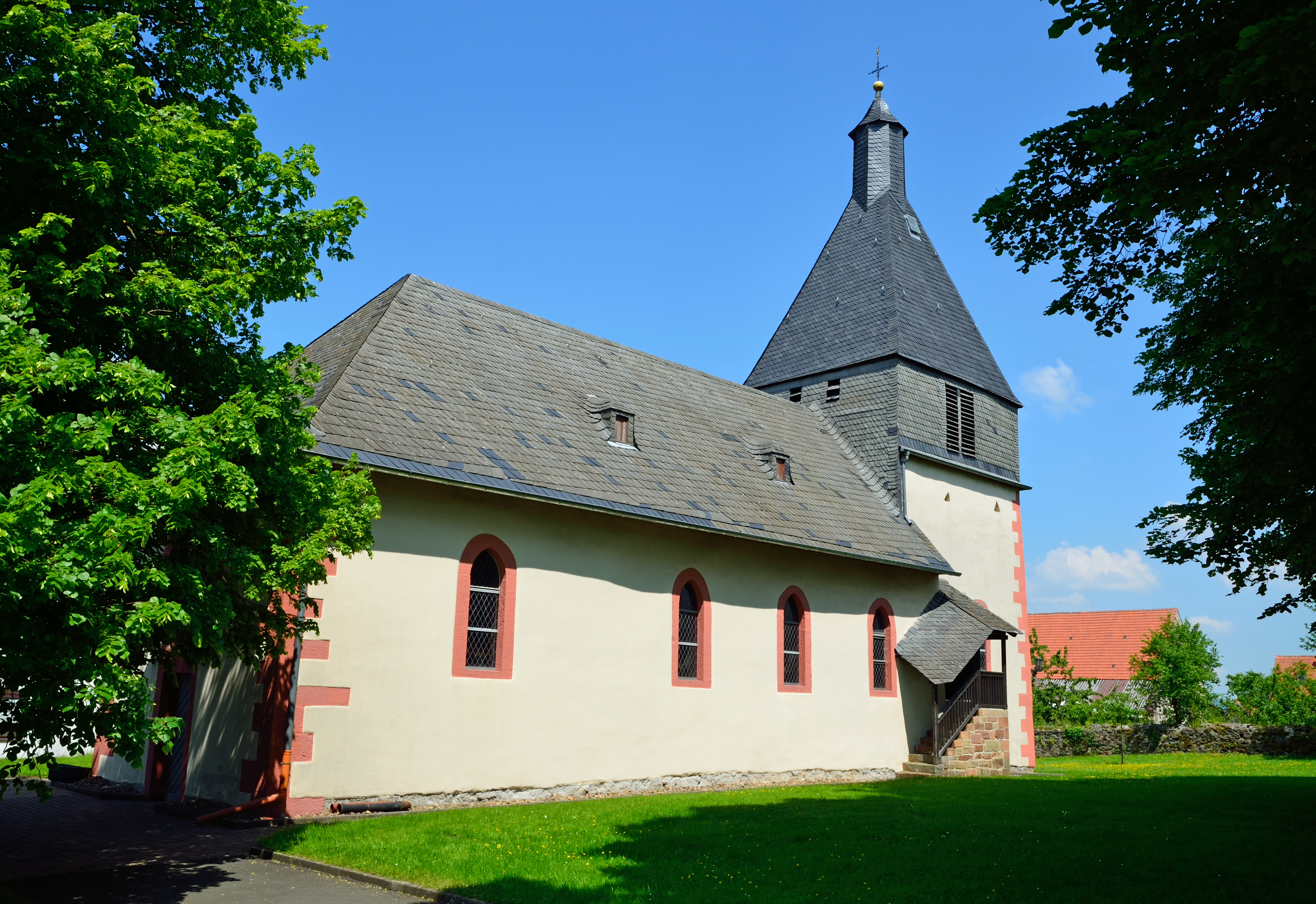 Ehemalige Klosterkirche und heute Dorfkirche in Hachborn mit der alten Klostermauer im Hintergrund. Ansicht von Südwesten.